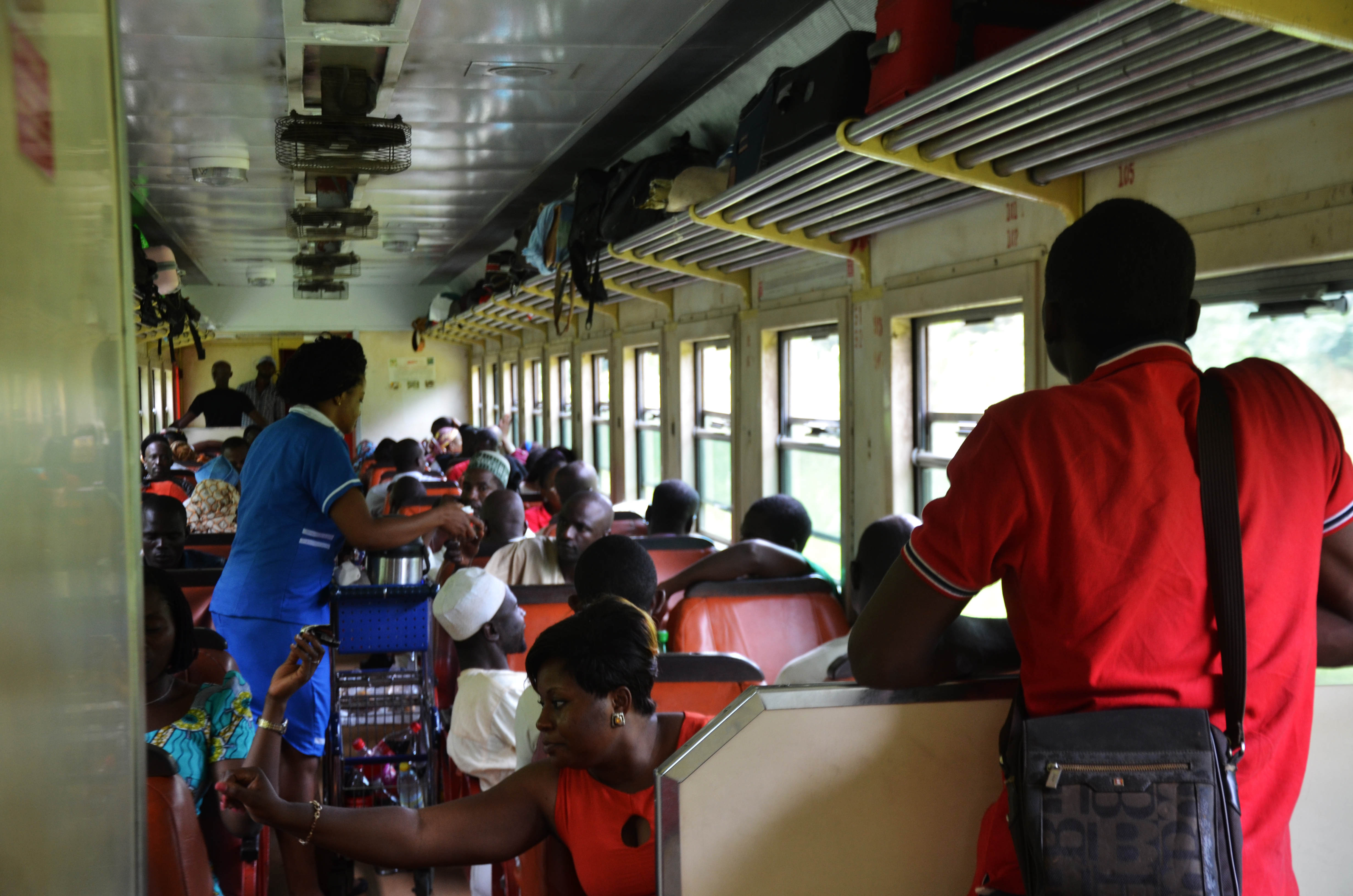 Dans une voiture d’un train voyageur au Cameroun This is an image with the theme "Africa on the Move or Transport" from: Cameroon